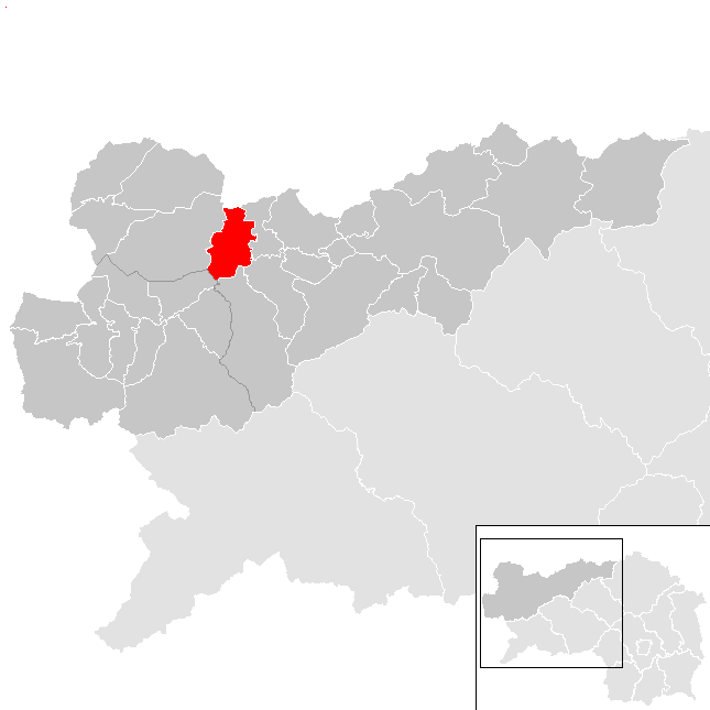 Lage von Stainach-Pürgg im Bezirk Liezen